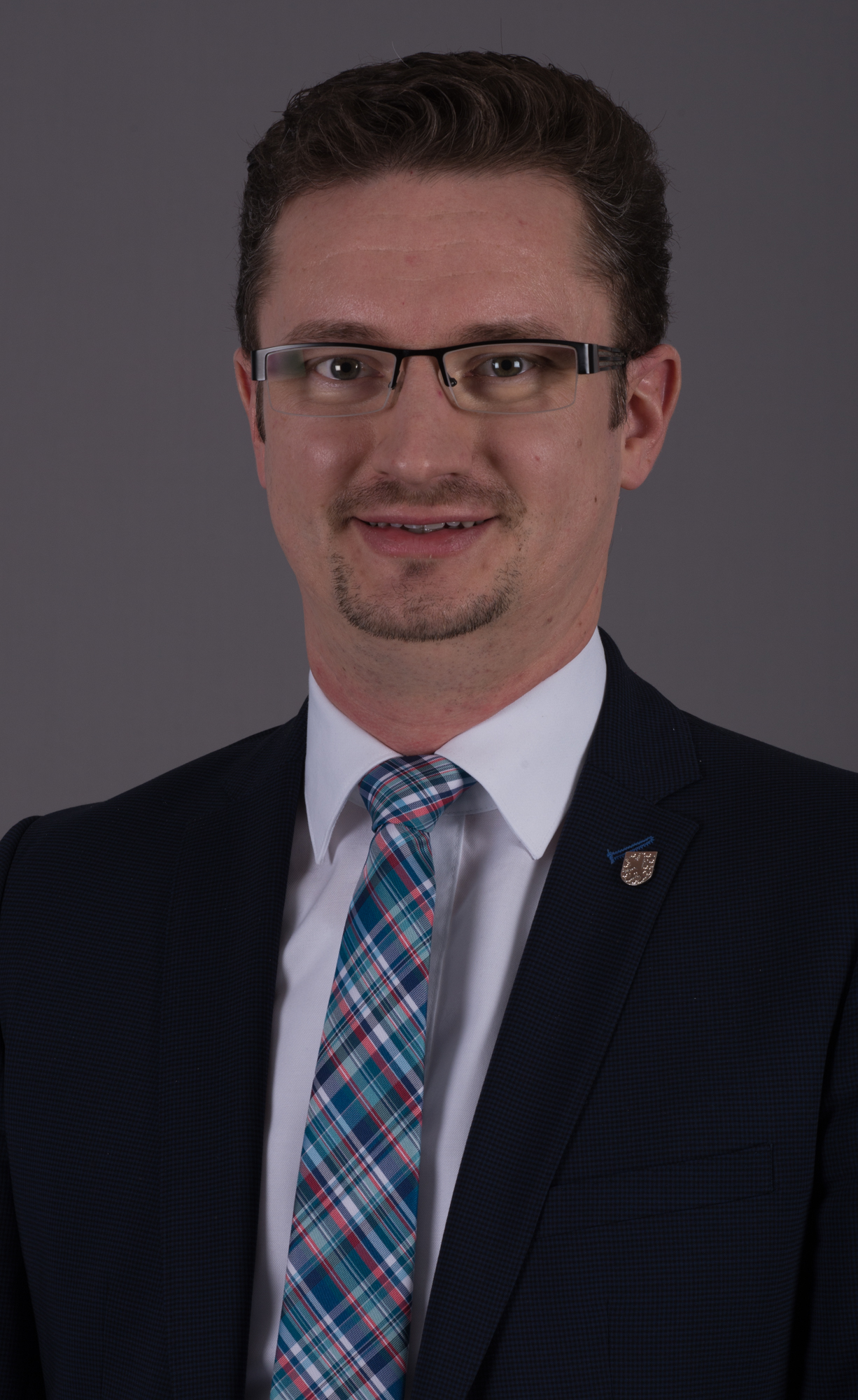 Landtagsprojekt im Thüringer Landtag